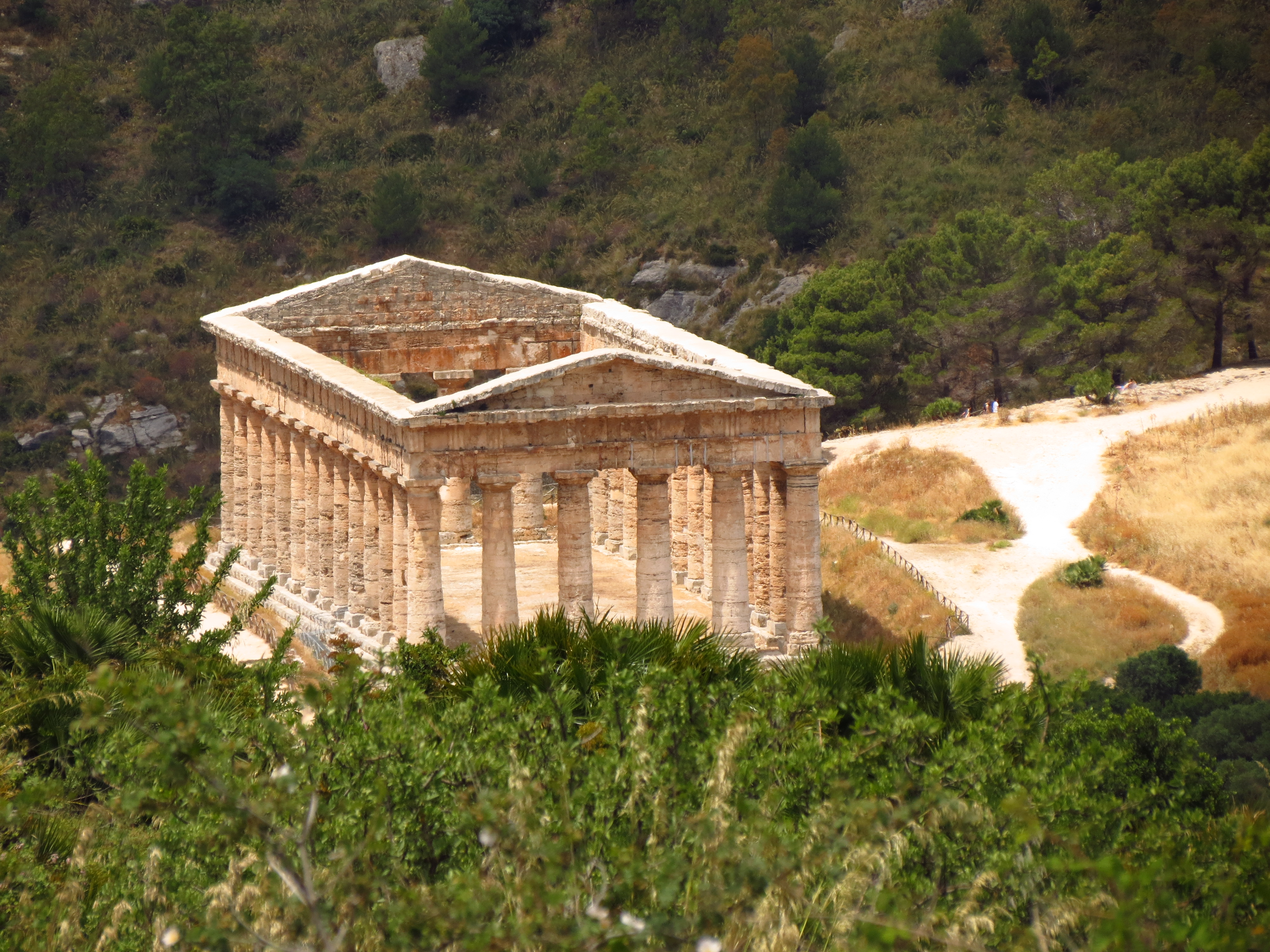 Vue de la Sicile.